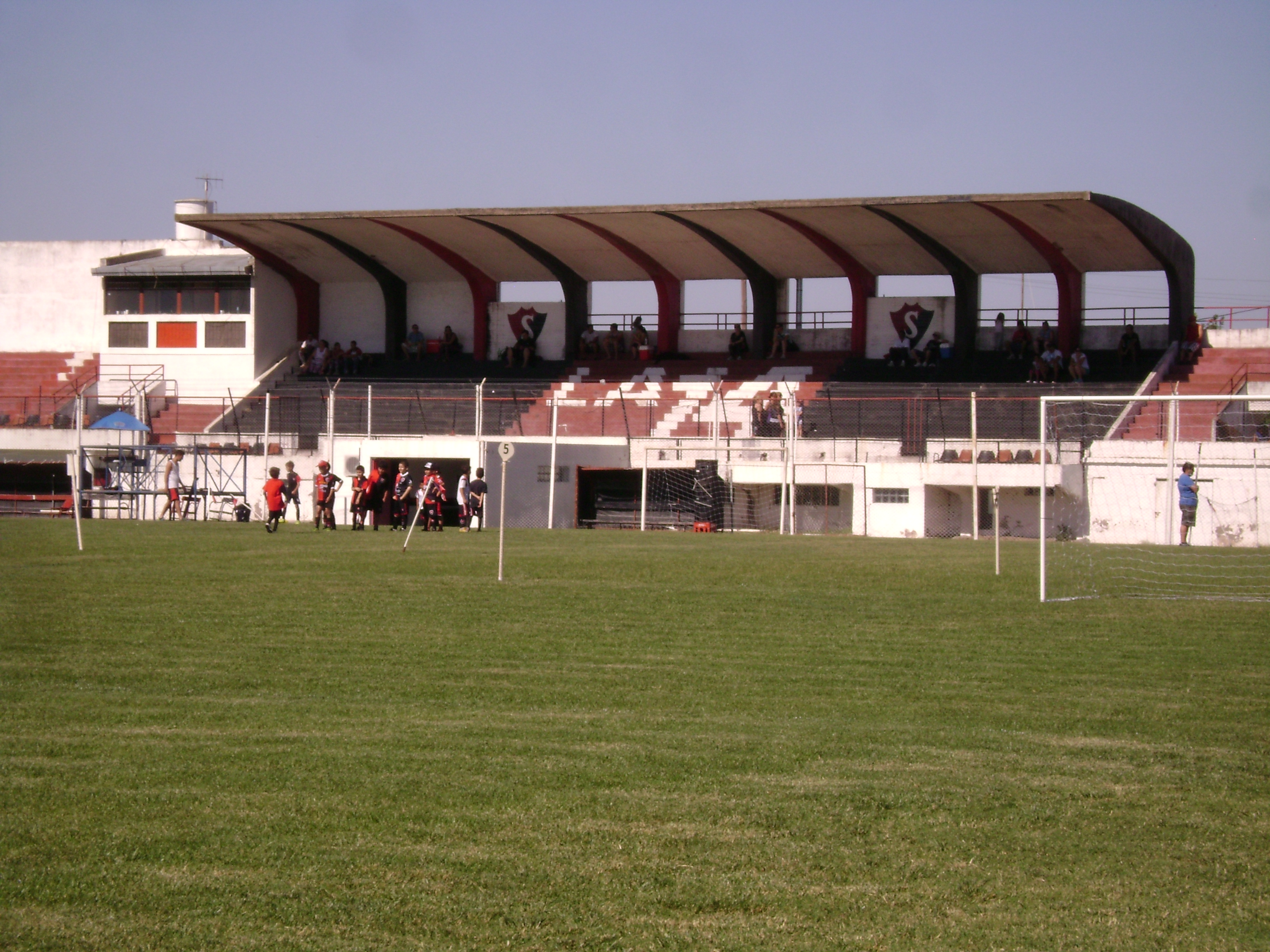 "La visera", tribuna popular donde esta la hinchada de Sporting, "La 14".